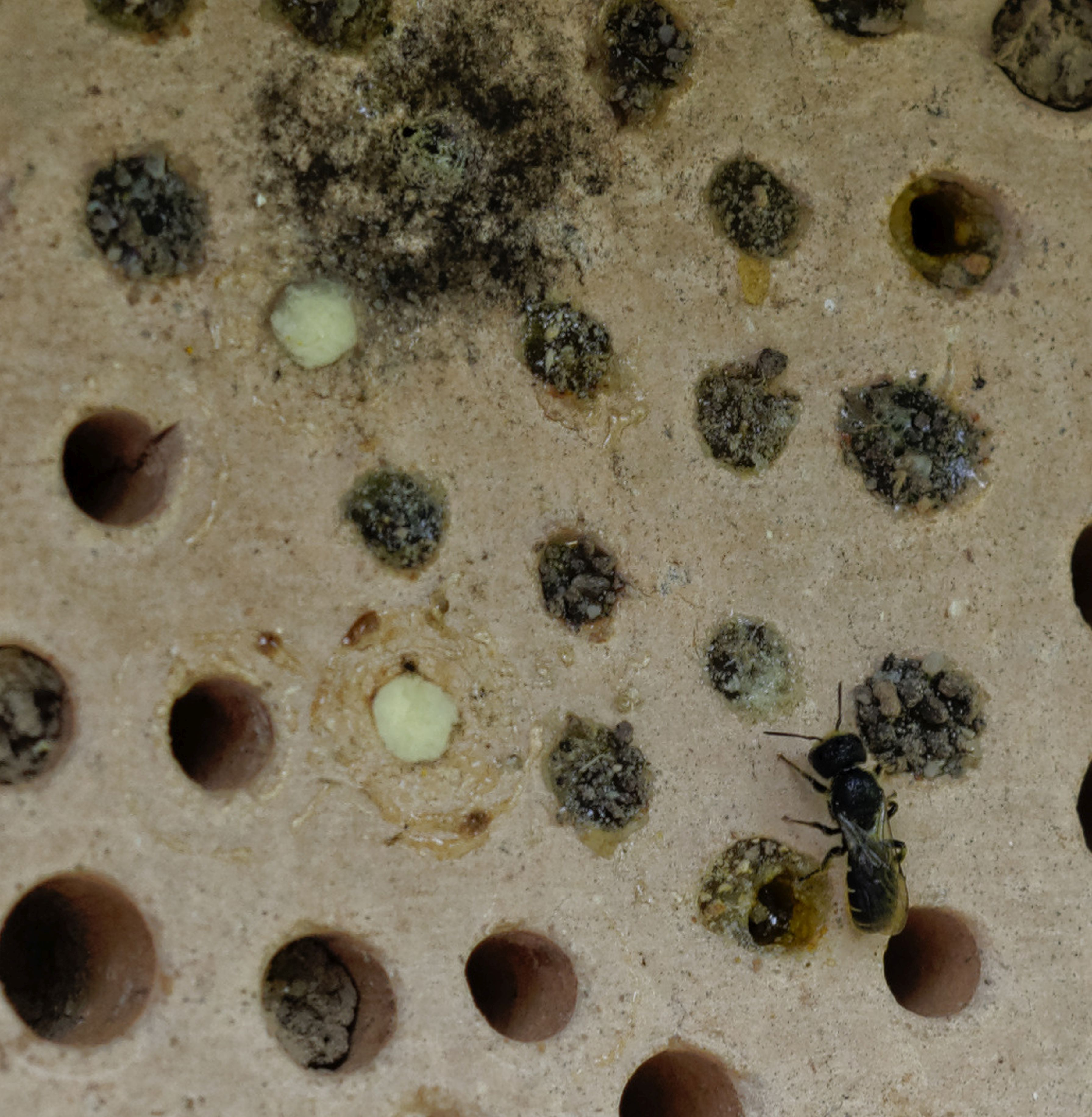 Bilder vom Insektenhotel